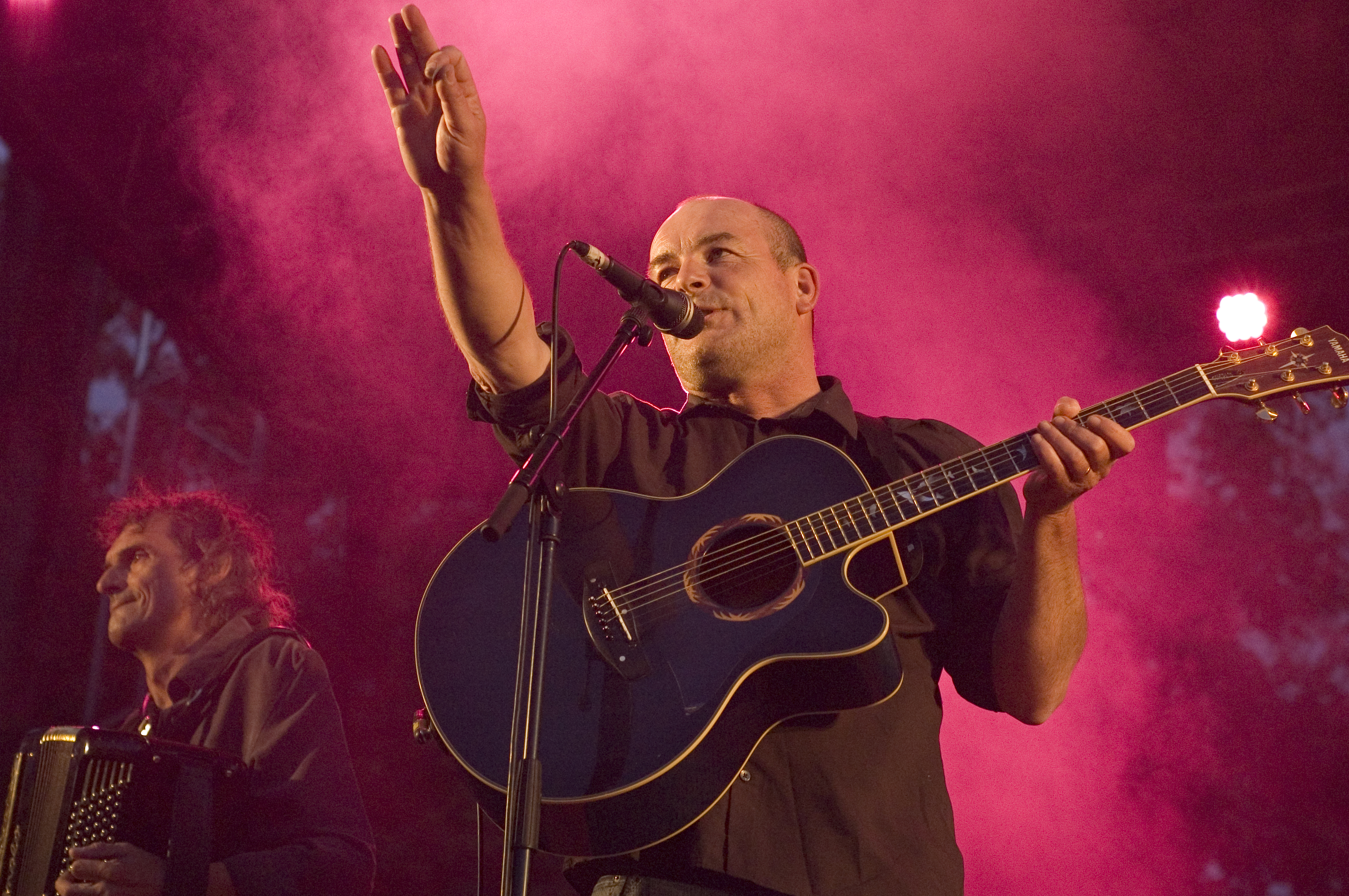 Niort 2011